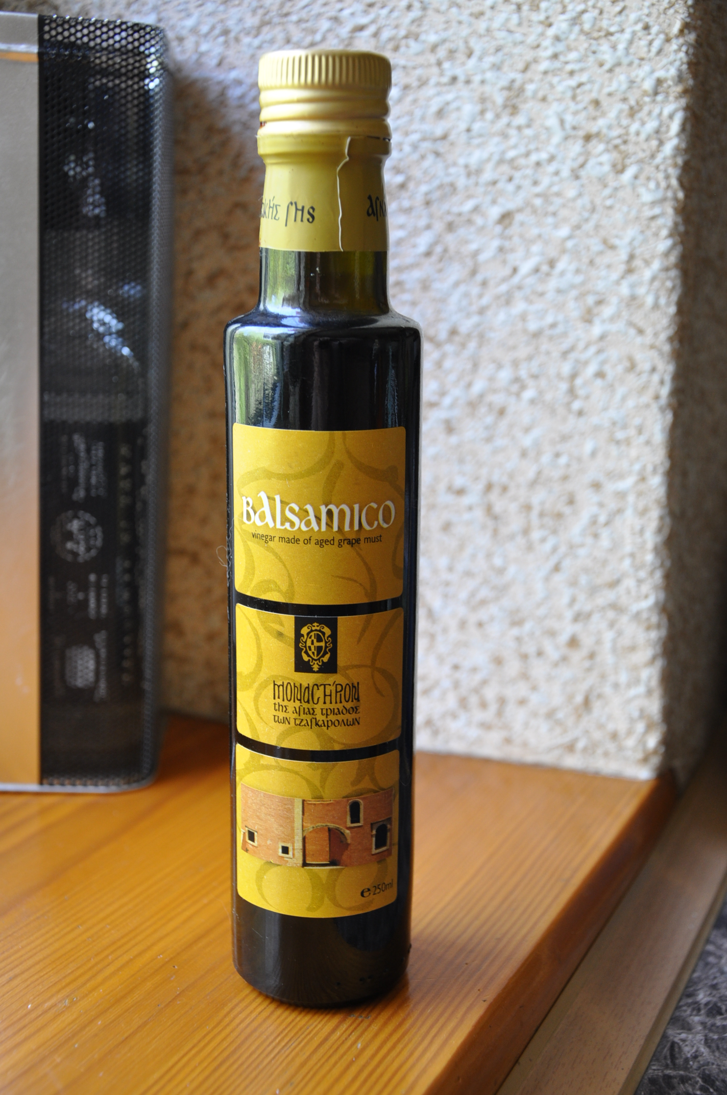 "Balsamico" vinegar made of aged grape must. Monastery Agia Triada of Tzagarolon. 250ml